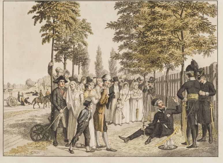 Das Lager Herzog Friedrich Wilhelms von Braunschweig-Oels, vor dem Gefecht bei Ölper